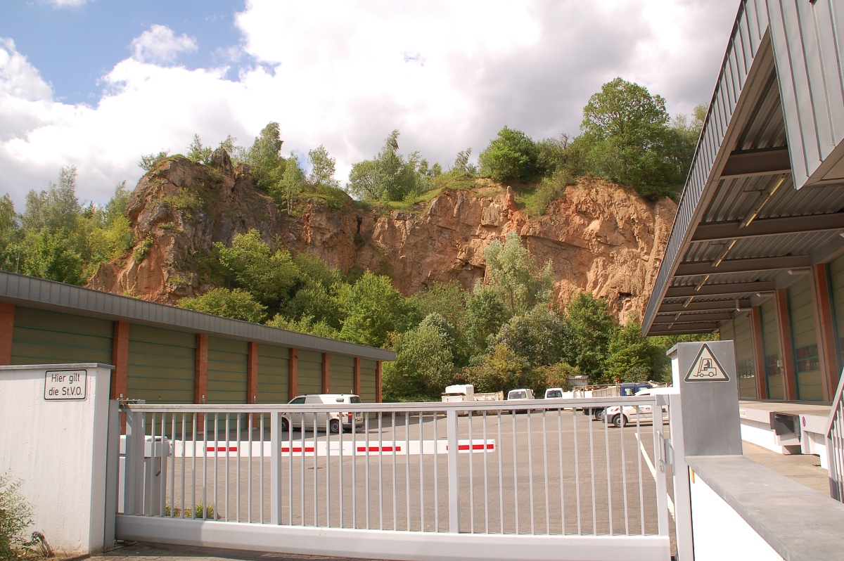 Devonsiche Kalksteinbrüche bei Steeden, Runkel (Lahn), Hessen, Deutschland